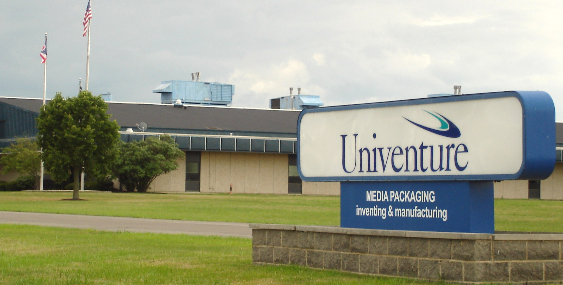 Marysville Univenture.jpg